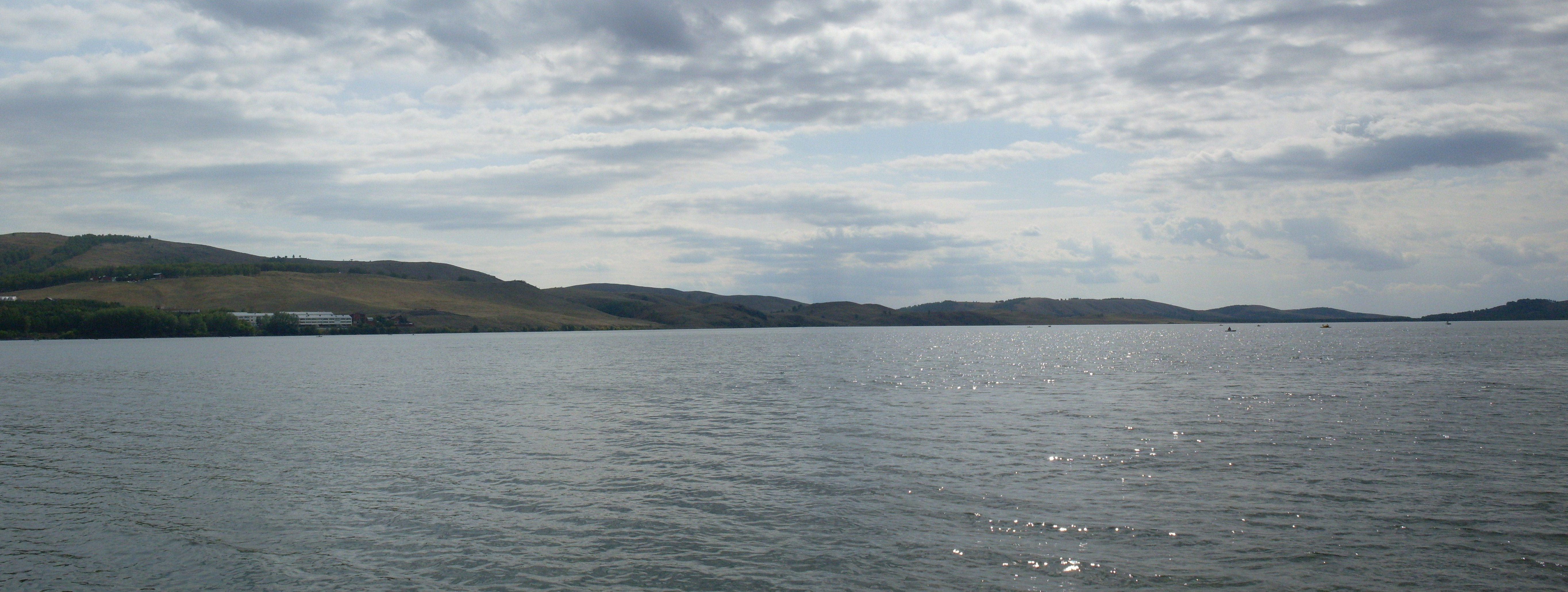 Банное озеро 2009 год